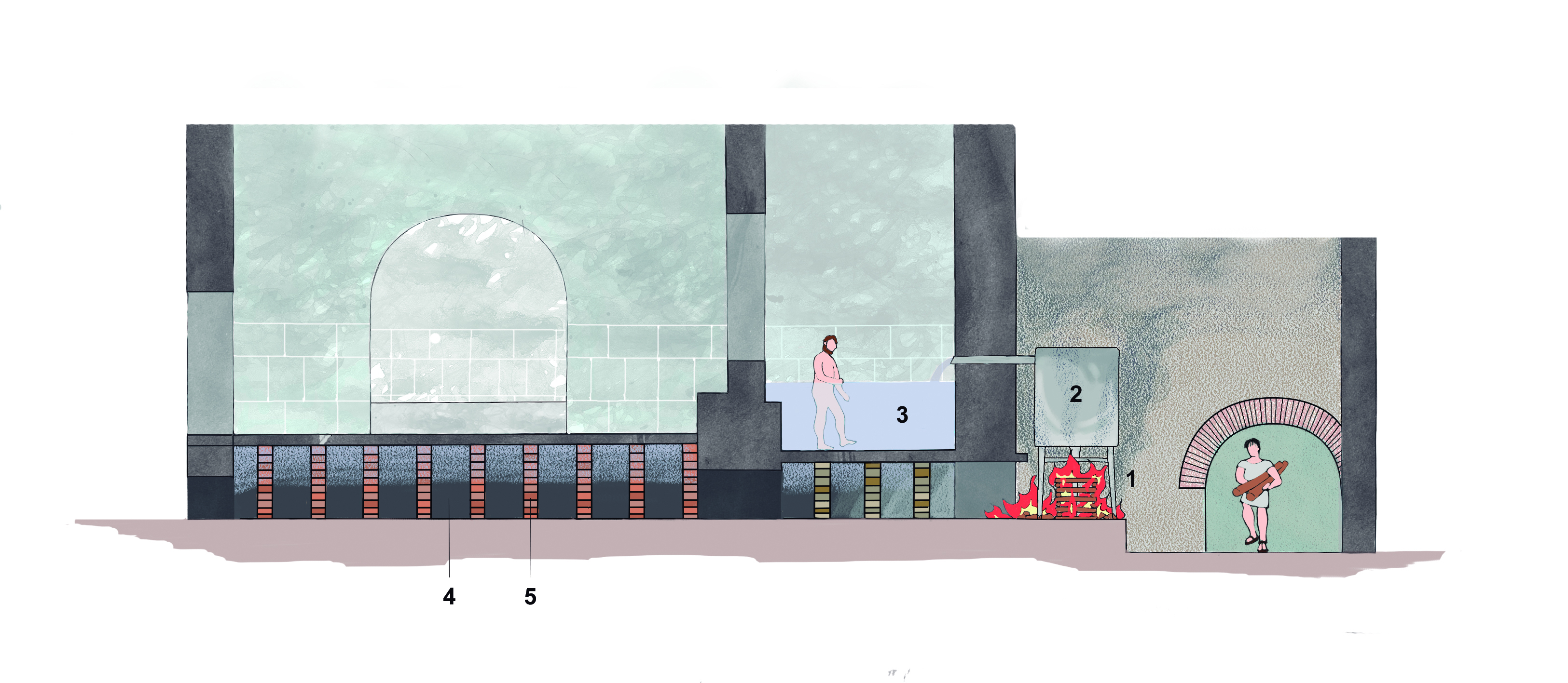 Secció reconstructiva d’un caldarium (estança calefactada) amb el praefurnium (forn). A partir de les restes conservades d’una de les estances calefactades de l’edifici de banys de la vil·la romana dels Munts (Altafulla, Tarragonès). Segles II – III dC. Dibuix digital realitzat per Dylan Calaf, alumne de 2n curs d’Il·lustració de l’EADT, amb l’assessorament científic del Museu Nacional Arqueològic de Tarragona (Francesc Tarrats, Montserrat Perramon, Josep Anton Remolà i Pilar Sada). 1. Forn 2. Caldera 3. Banyera d’aigua calenta (Alveus) 4. Sistema de calefacció (Hypocaustum) 5. Pilars de sustentació (Pilae) Fonts: P.M. Berges (1977), “Nuevo informe sobre els Munts”, Estudis Altafullencs 1, Tarragona, 27- 47. J. López (1993), “Les termes inferiors de la vil·la romana dels Munts”, Utilització de l’aigua a les ciutats romanes, Documents d’Arqueologia Clàssica 0, Tarragona, 57-80. F. Tarrats, J.M. Macias, E. Ramón i J.A. Remolà (2000), “Nuevas excavaciones en el área residencial de la villa romana de ‘Els Munts’ (Altafulla, Ager Tarraconensis), estudio preliminar”, Madrider Mitteilungen 41, 358-379, Tafel 64-67.